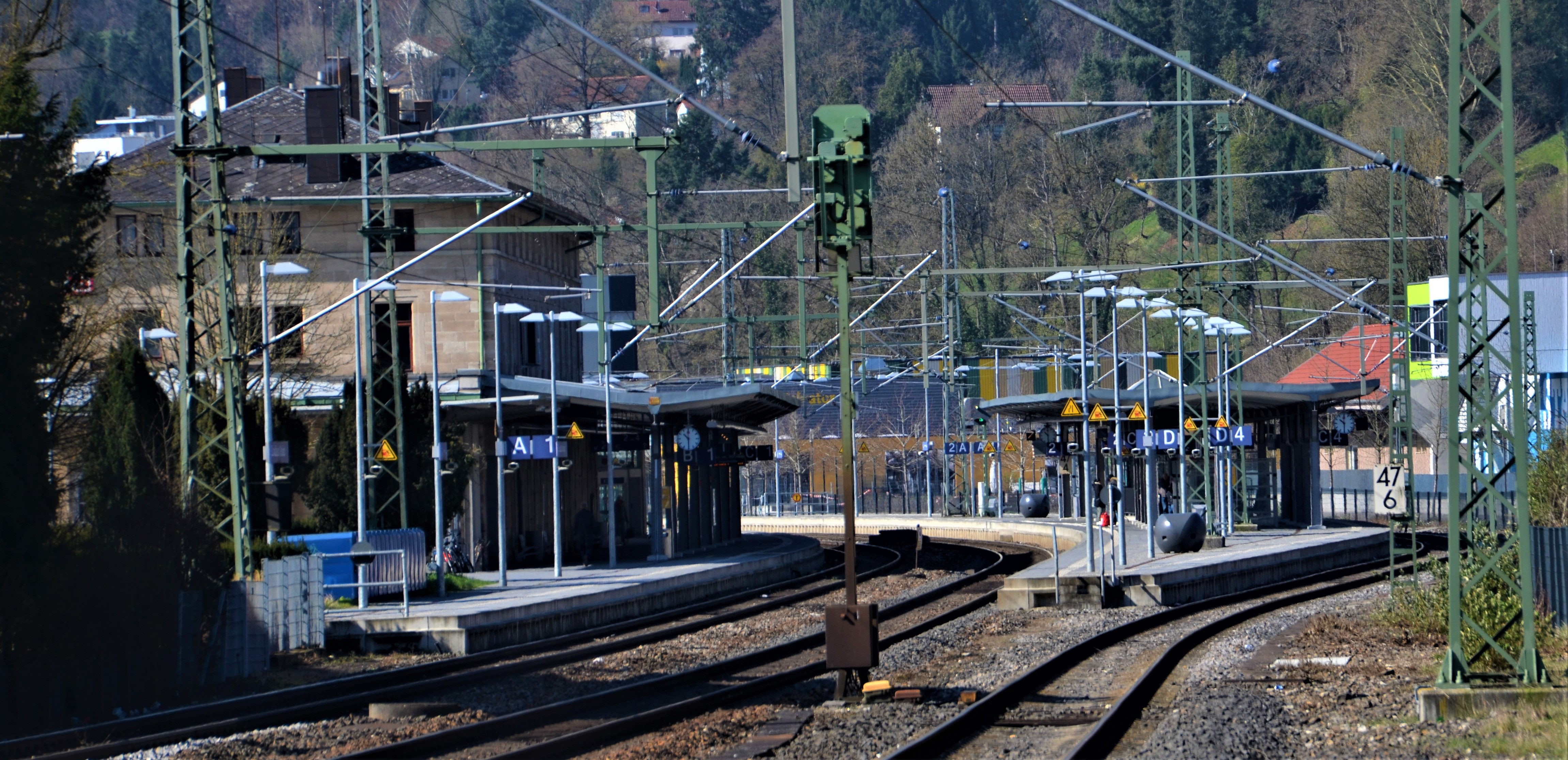 Gleisanlagen des Bahnhofs Schwäbisch Gmünd von Osten (von der Lindenfirststraße aus) aufgenommen